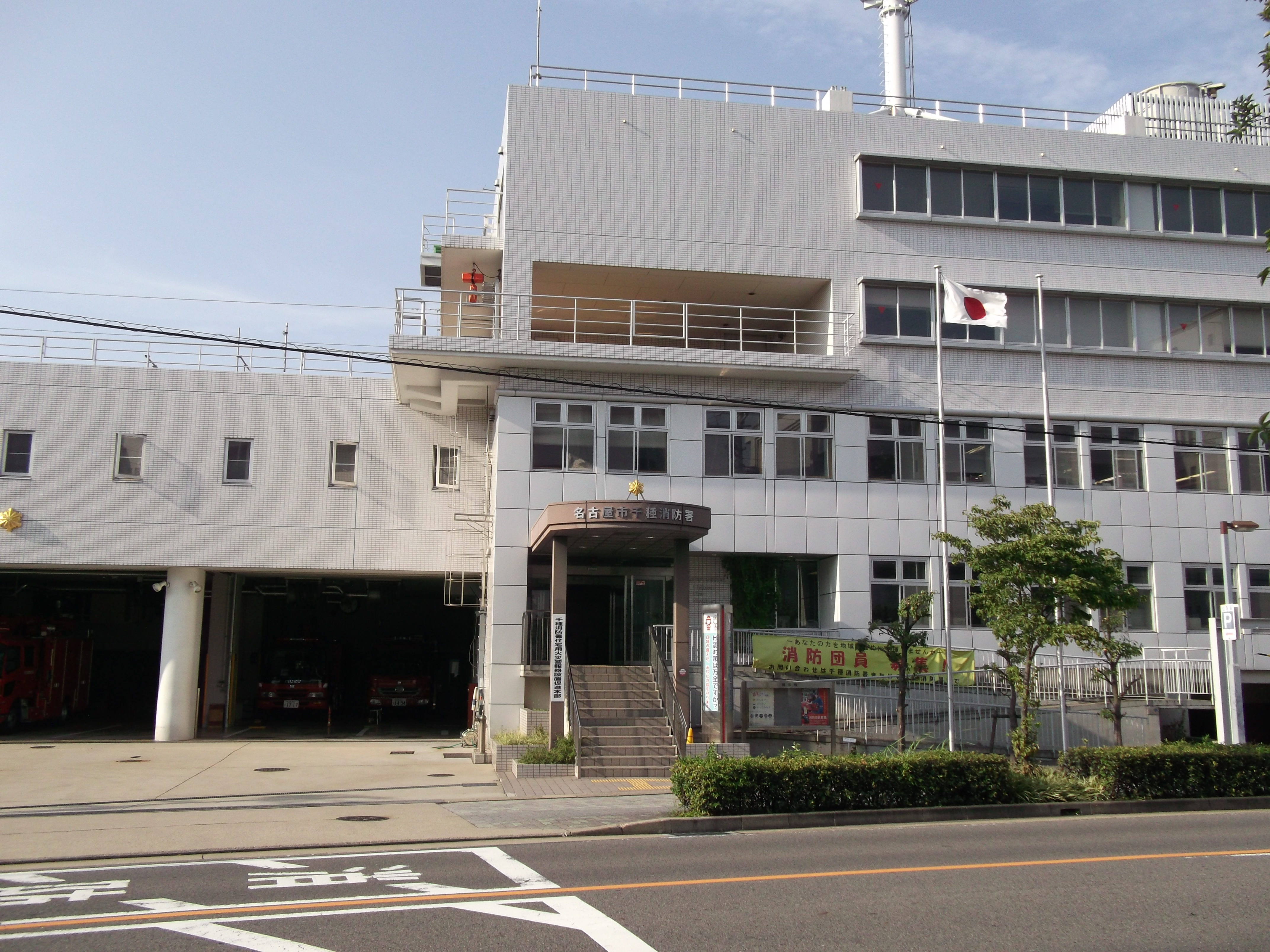 名古屋市千種区希望ヶ丘の千種消防署